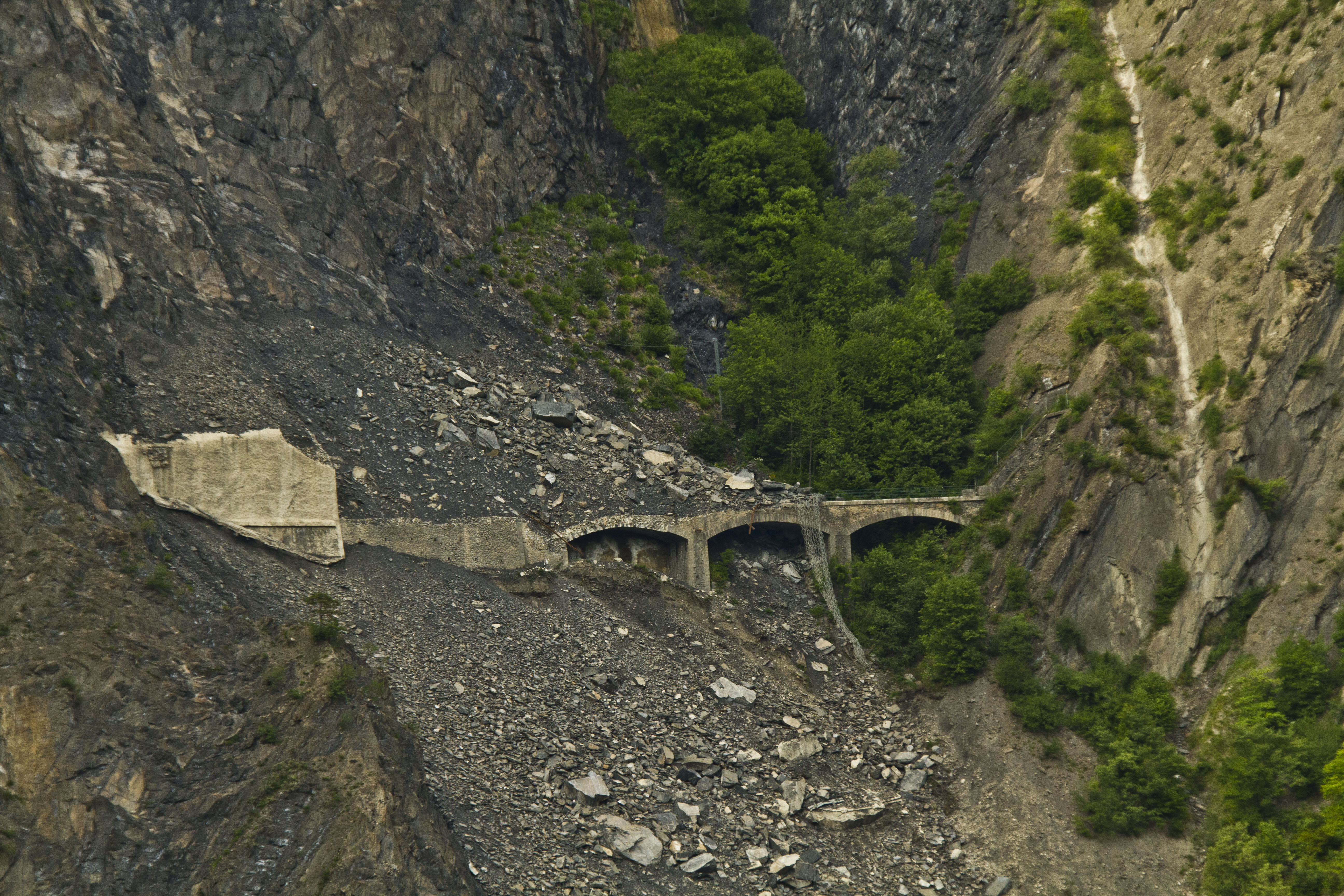 Eboulement du chemin de fer de la Mure -Monteynard